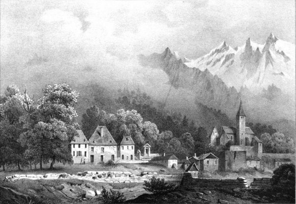 Album du Dauphiné - tome IV, litographie de Valbonnais (Isère)